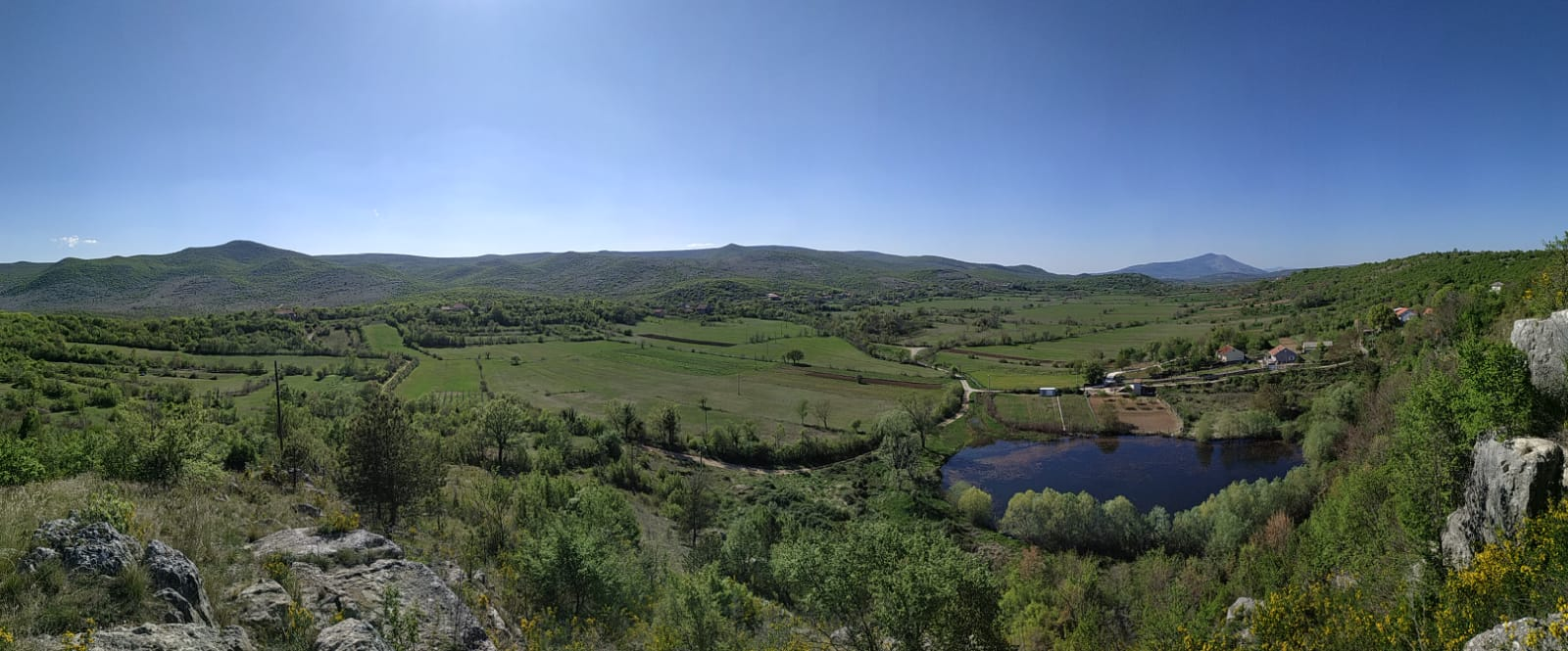 Pogled na planinu Moseć, selo Umljanović i Gabelino jezero sa brda Greda.